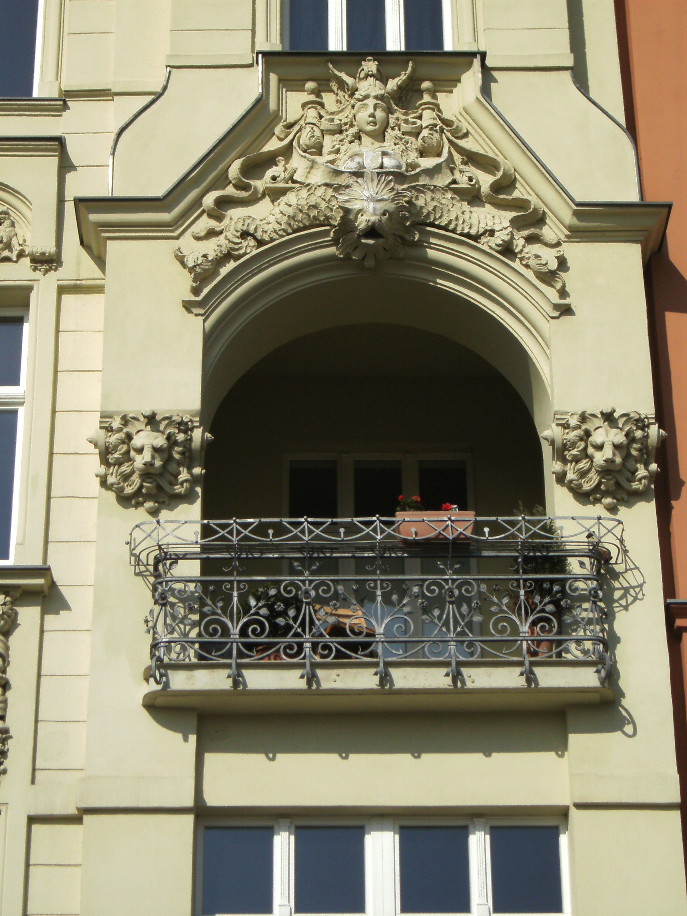 Schillerstraße 61, 1